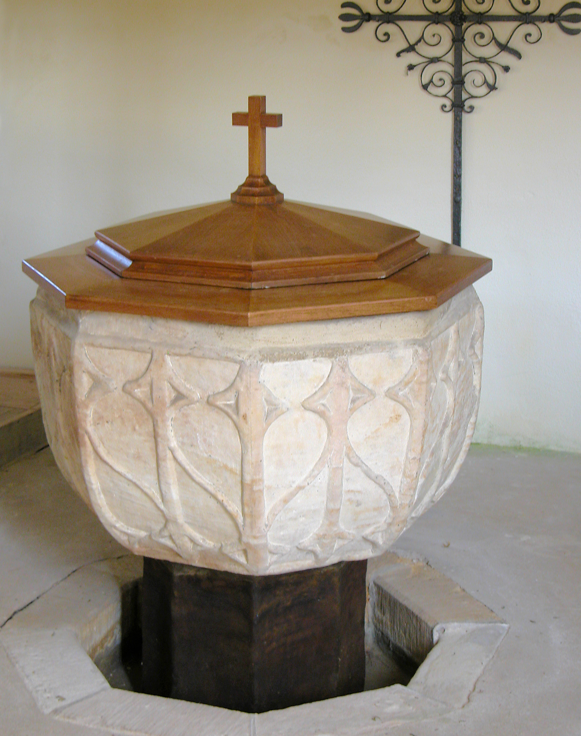 02.09.2011 09600 Niederschöna (Halsbrücke), Schulgasse (GMP: 50.966258,13.422008): St. Annen, Dorfkirche Niederschöna. Die heutige barocke Saalkirche entstand bei einem Umbau in den Jahren 1754/1755. Frühgotischer Taufstein mit achteckiger Kuppa und Maßwerkornament. Sein Alter wird auf 500 Jahre geschätzt. Er kann auf eine bewegte Vergangenheit zurückblicken. Mitte des 19. Jahrhunderts verschwand er plötzlich, wahrscheinlich bei Bauarbeiten in der Kirche. Erst im Jahr 1937 fand man ihn wieder. Er wurde in einem Erlichter Gehöft als Gänsetrog genutzt. [DSCNn2654.TIF]20110902040DR.JPG(c)Blobelt